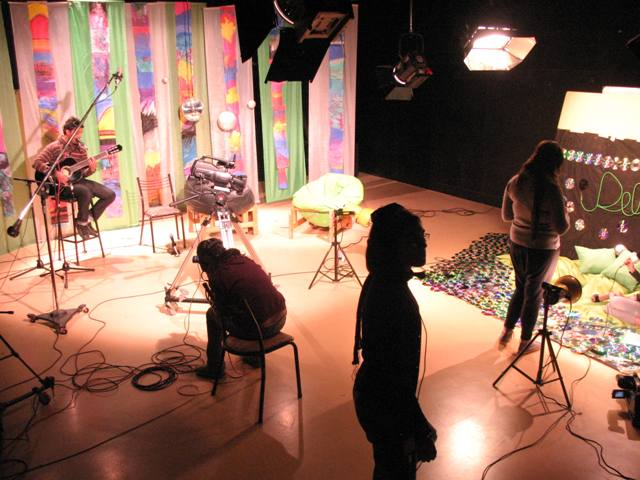 Trabajo práctico de estudiantes de la Licenciatura en Diseño y Producción Audiovisual, programa de TV "Delay"